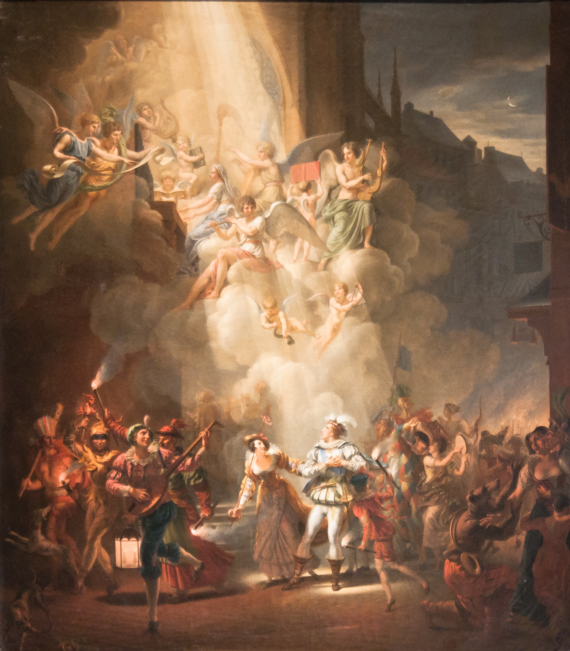 La Conversion d'Henri de Joyeusetitle QS:P1476,fr:"La Conversion d'Henri de Joyeuse" label QS:Lfr,"La Conversion d'Henri de Joyeuse"